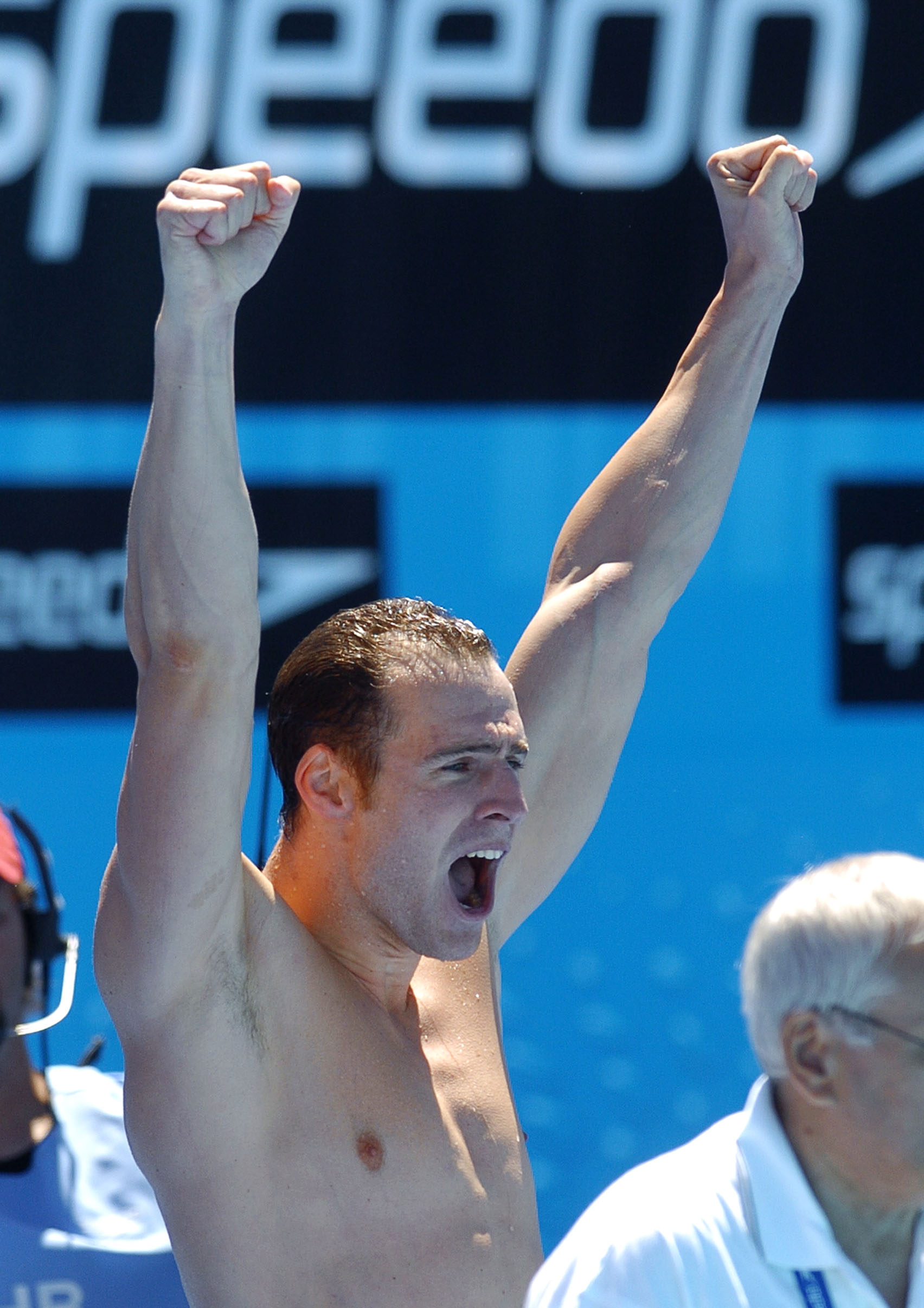 Montréal 2005